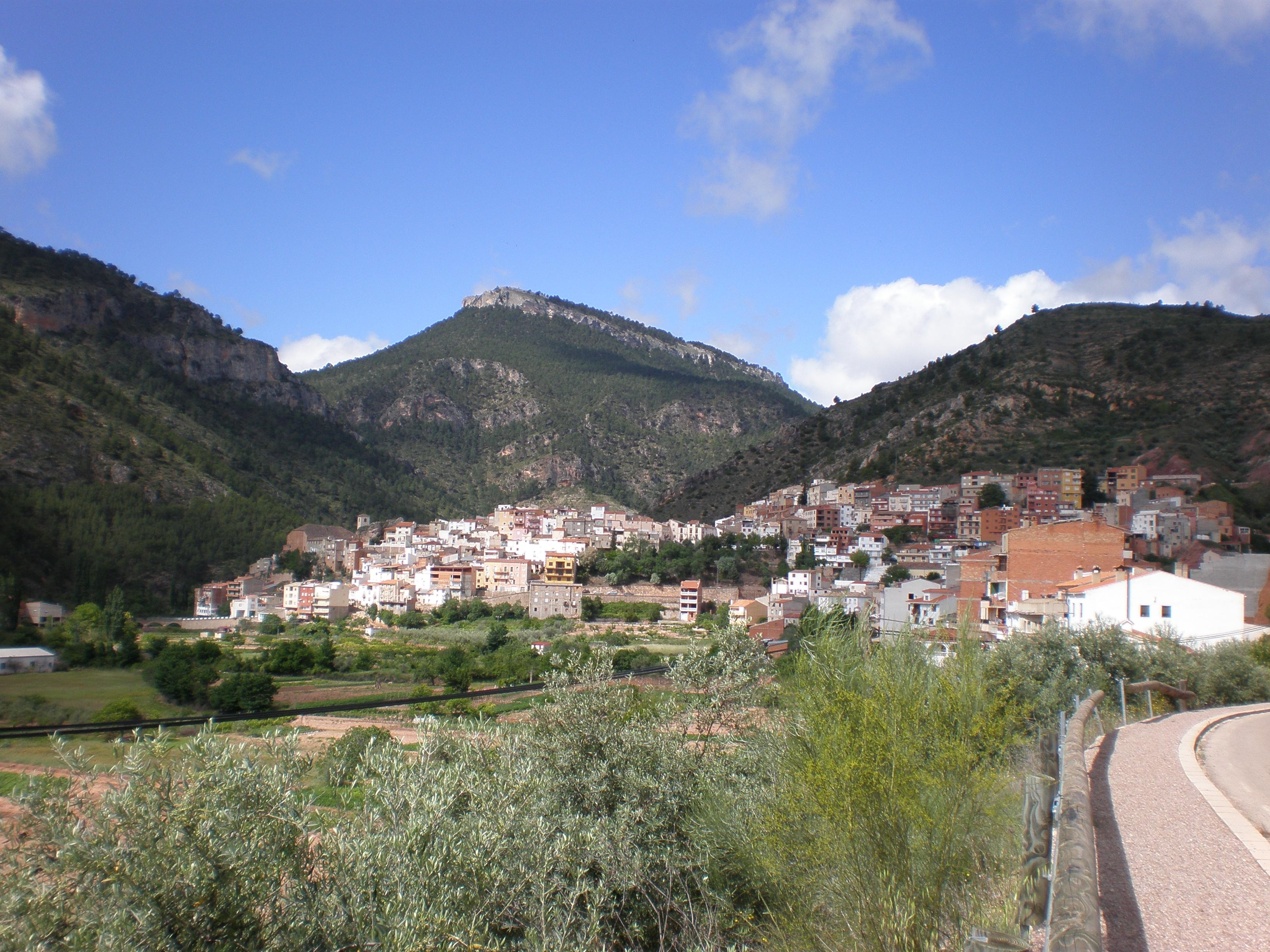 Vista parcial de Bogarra con el Padrastro (1503 m.) al fondo